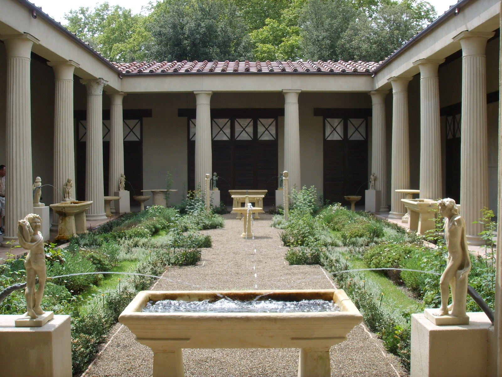 Ricostruzione del giardino della Casa dei Vettii a Pompei (mostra al giardino di Boboli, 2007).